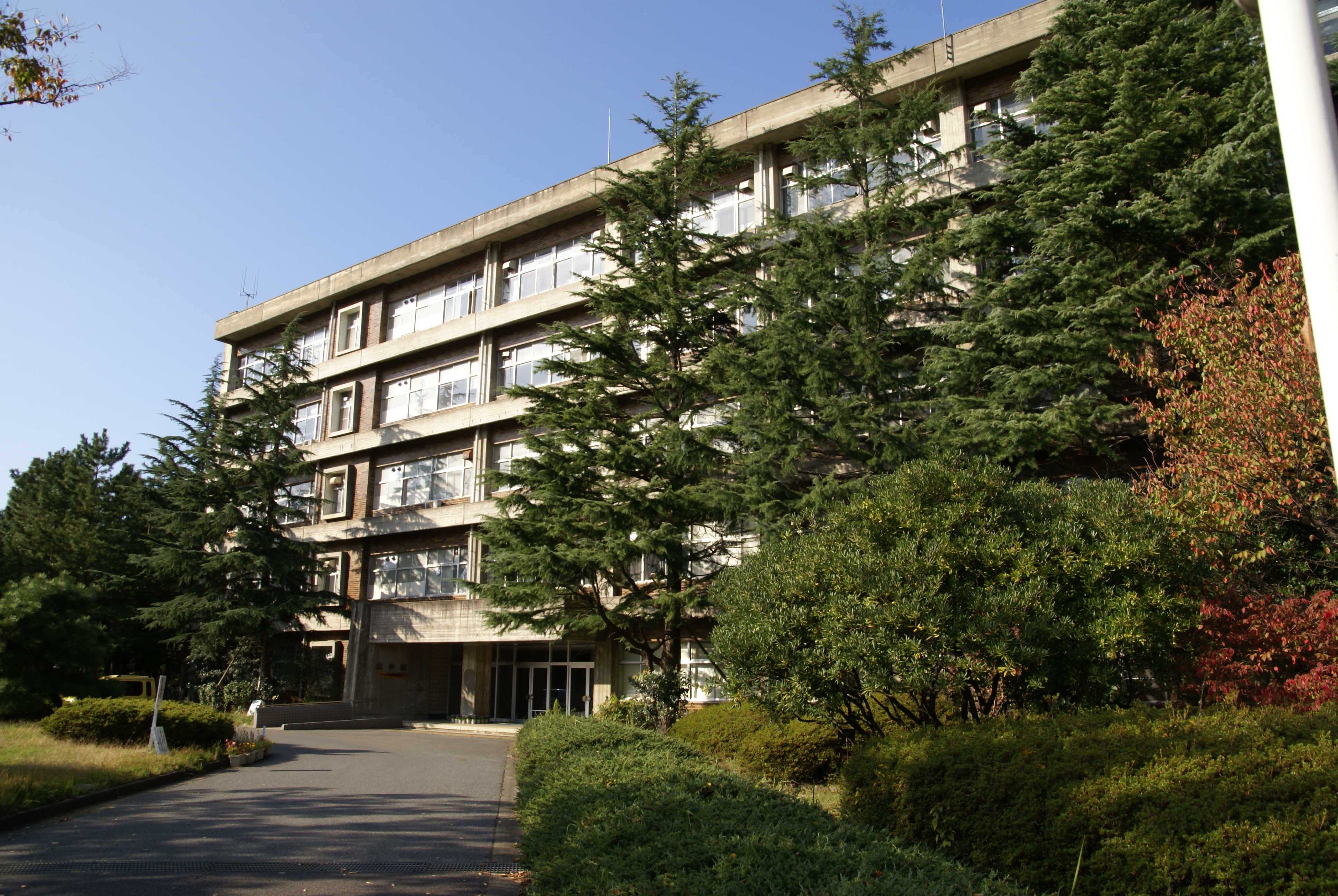 新潟大学農学部